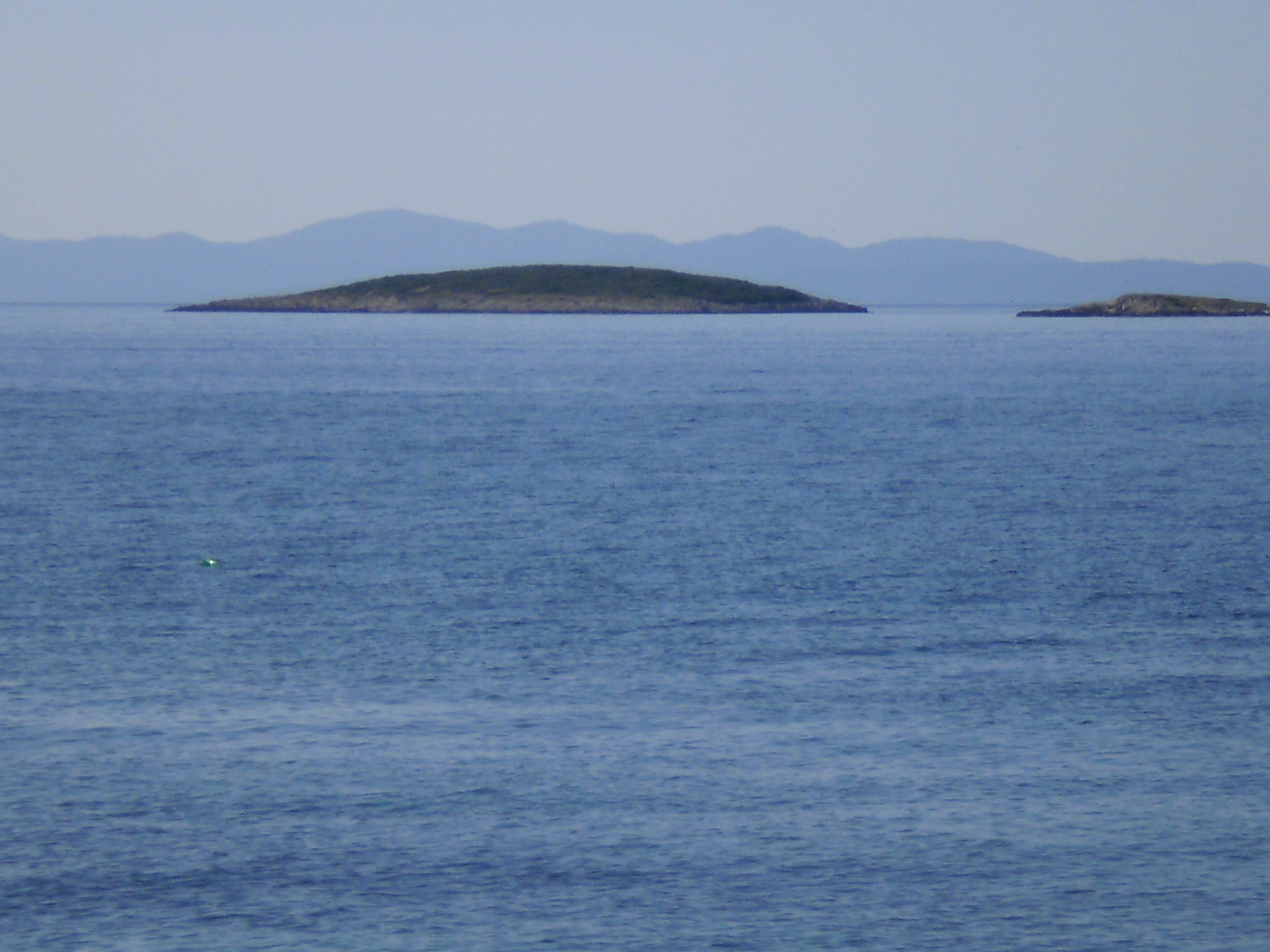 Otok Gojak